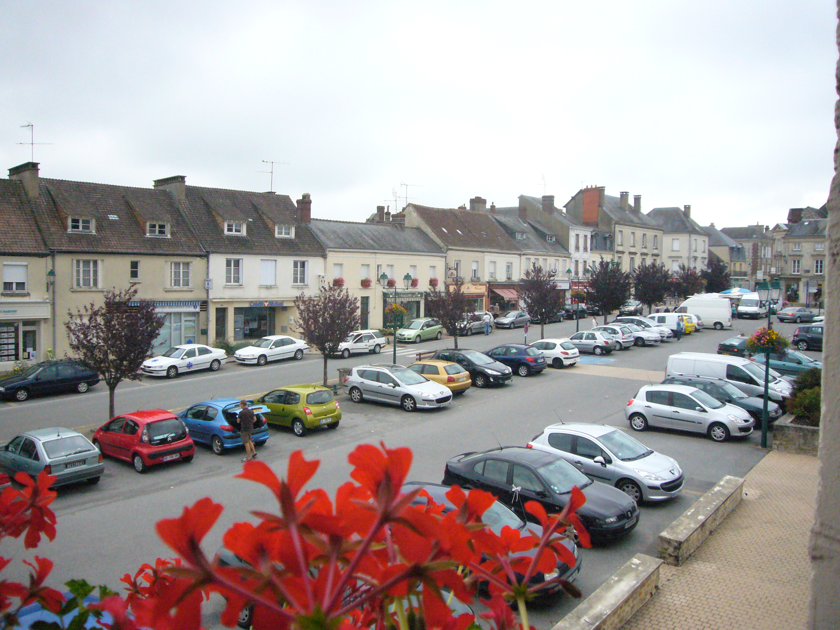 La place du village du Mêle-sur-Sarthe (Orne)